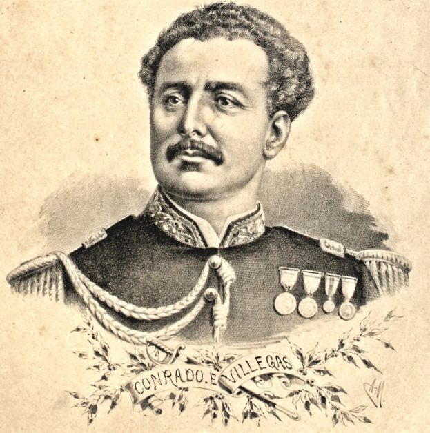 Conrado Villegas grabado aparecido en el número 15 de El Indiscreto el 7 de setiembre de 1884